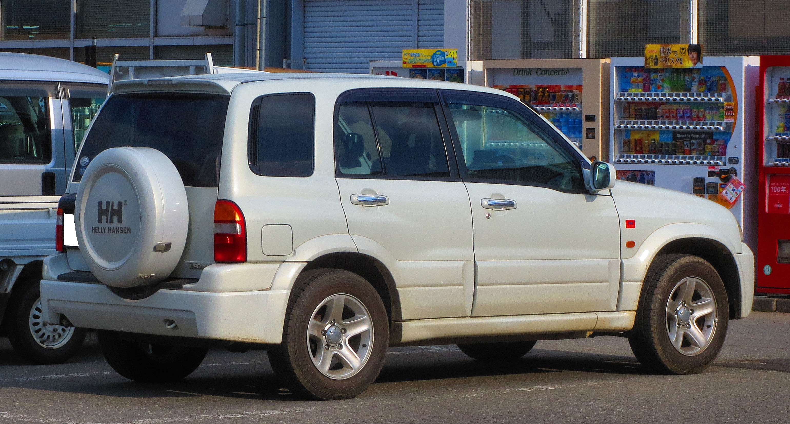 スズキ エスクード ヘリーハンセン リミテッド 4WD（2000年3月～2005年4月）